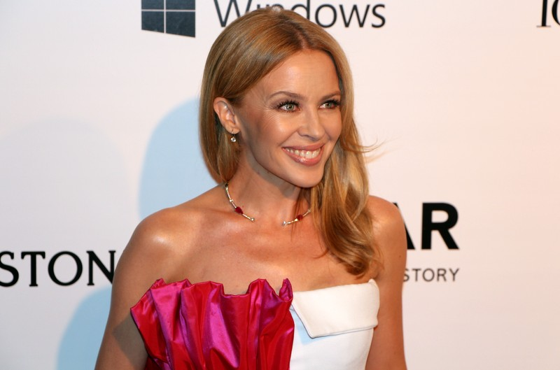 14 - Kylie Minogue